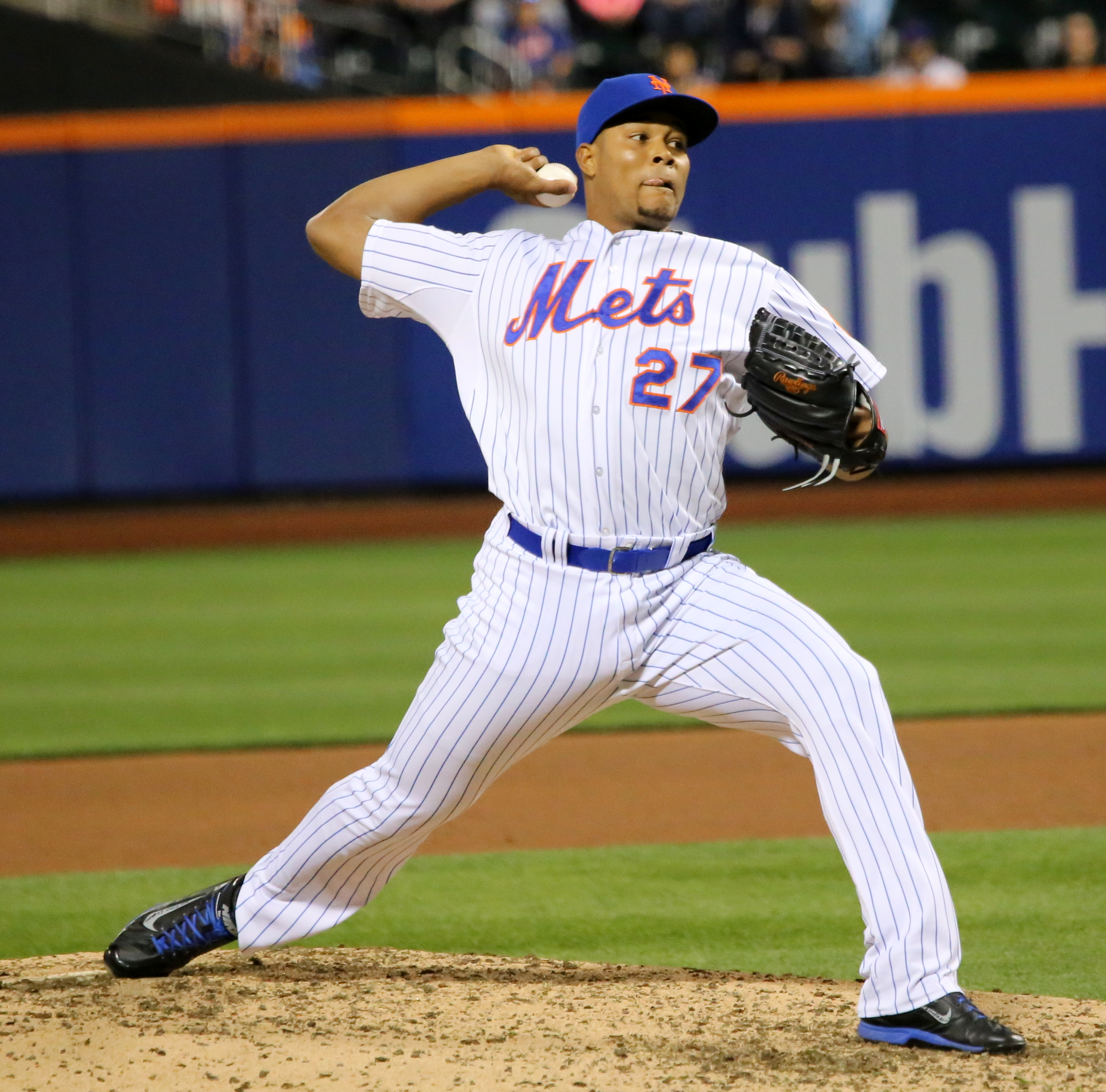 Jeurys Familia